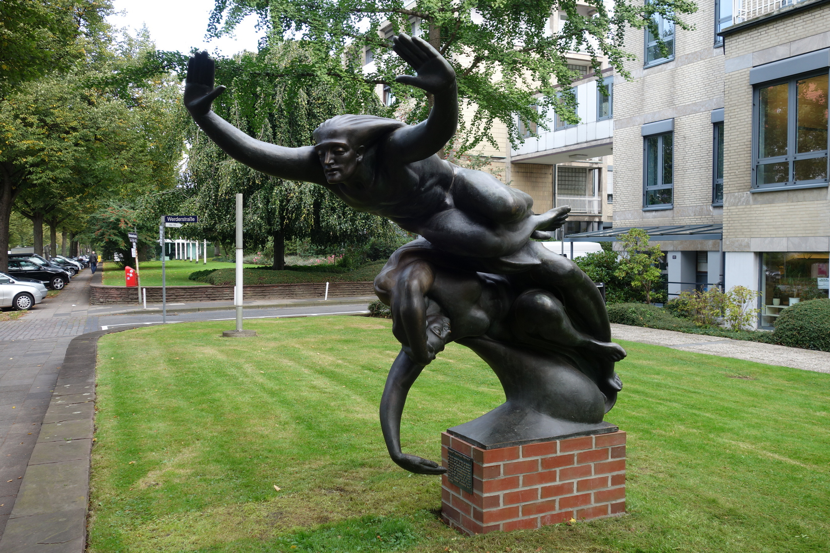 Friedrich Wield: "Ätherwelle" für Heinrich Hertz seit 30.9.2016 vor Haus 20 des NDR - Rothenbaumchaussee 122